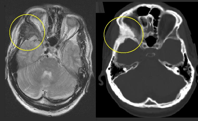 Fibröse Dysplasie des rechten Jochbeines (im Bild links, markiert). Korrespondierende T2-gewichtete Kernspintomographie (links) und CT (rechts) desselben Patienten Selbsterstellt, Lizenz: Public domain --MBq 16:03, 28. Jun 2006 (CEST)